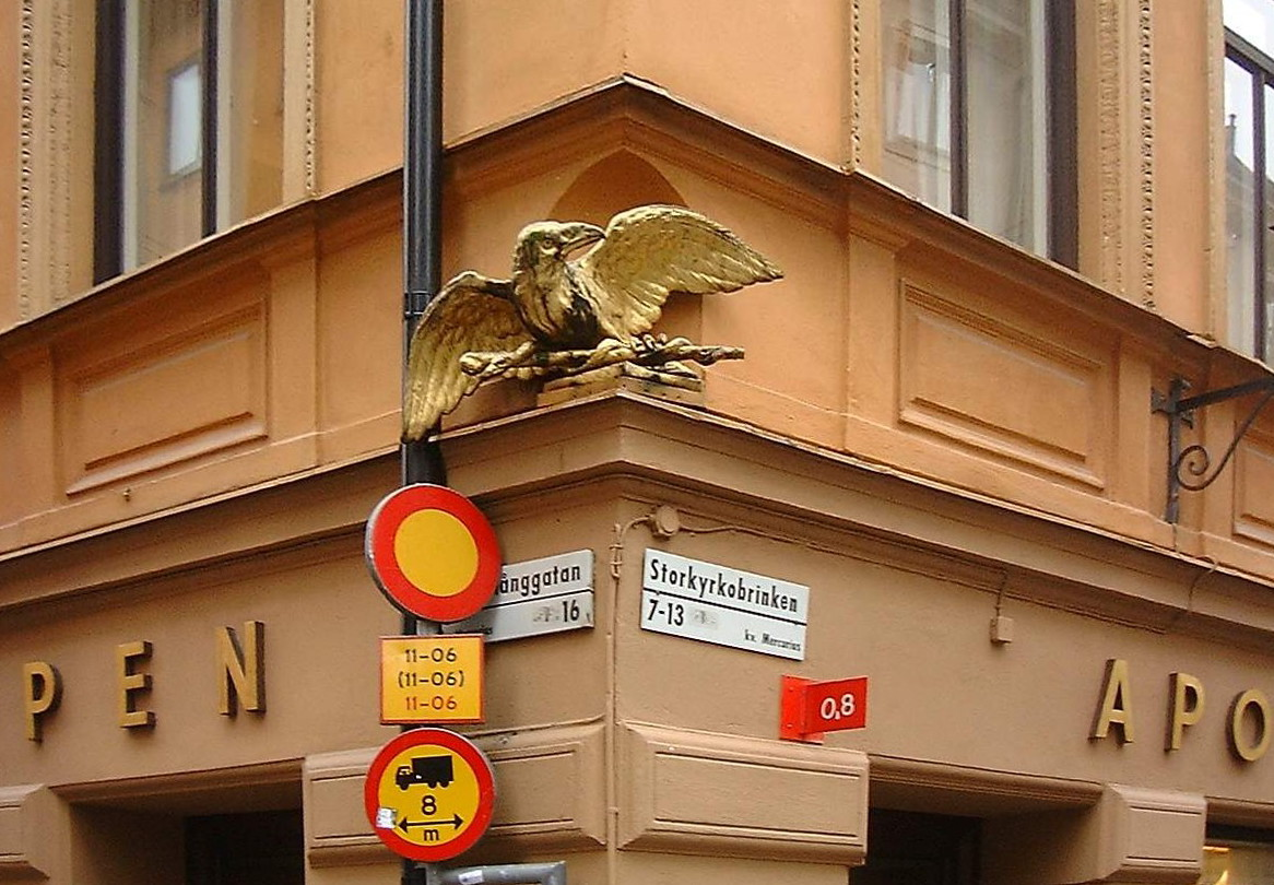 Västerlånggatan, Gamla stan, Stockholm